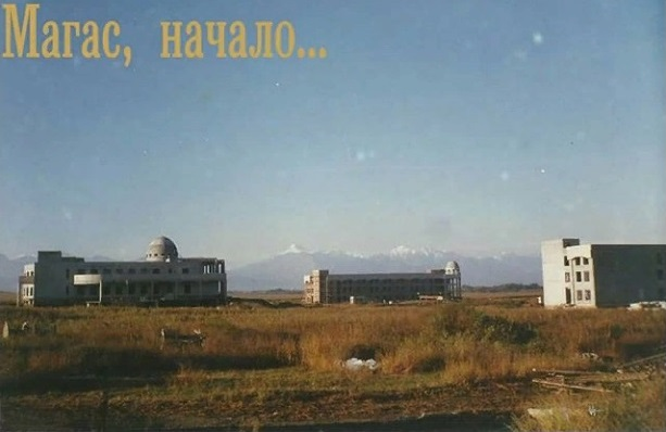 Магас